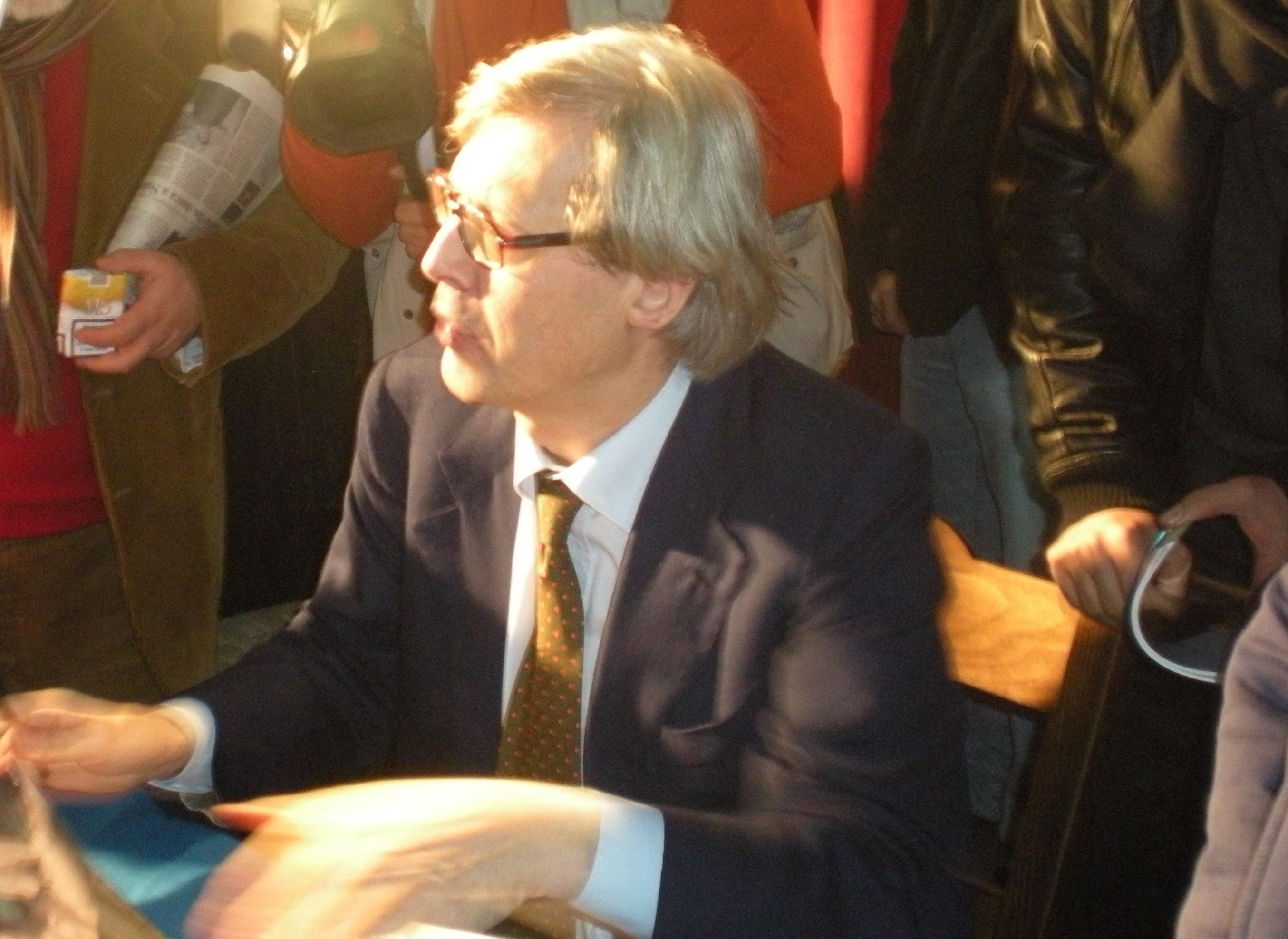 Vittorio Sgarbi a Bivona